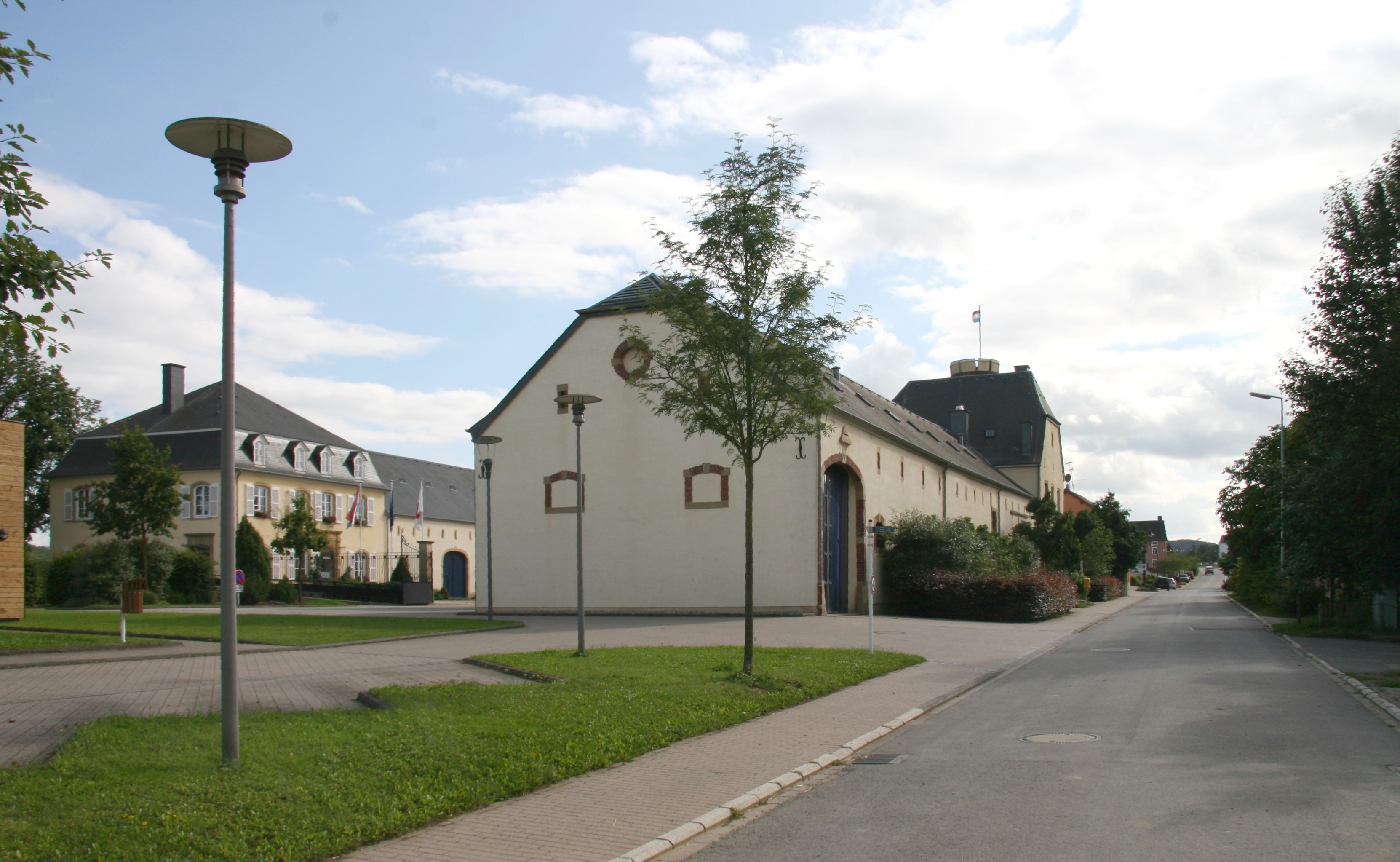 D'Gemengenhaus vun der Gemeng Betzder, zu Bierg (Town hall of the municipality of Betzdorf, in Berg, Luxembourg)